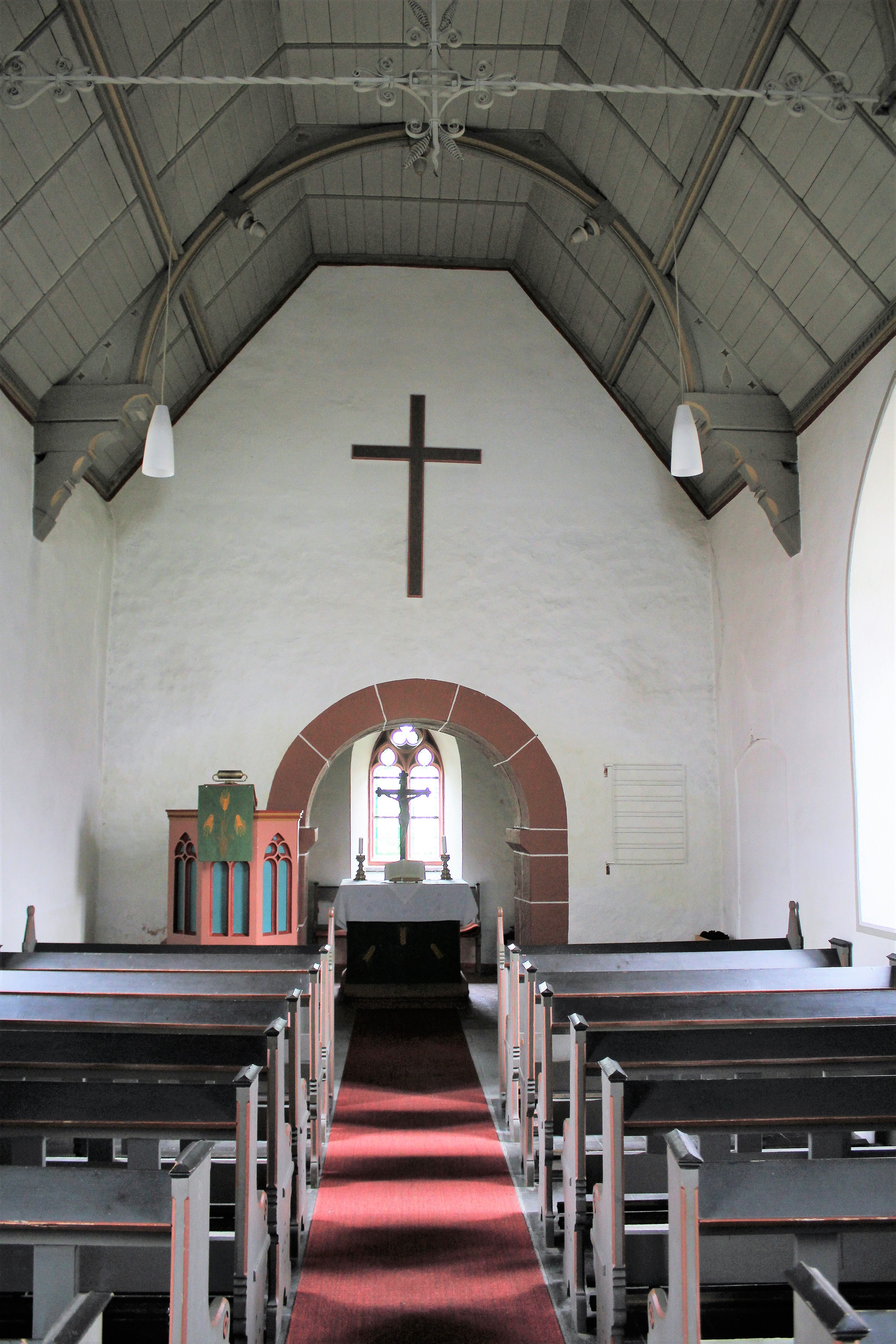 Evanglische Kirche Bortshausen, Landkreis Marburg-Biedenkopf, Hessen, Deutschland